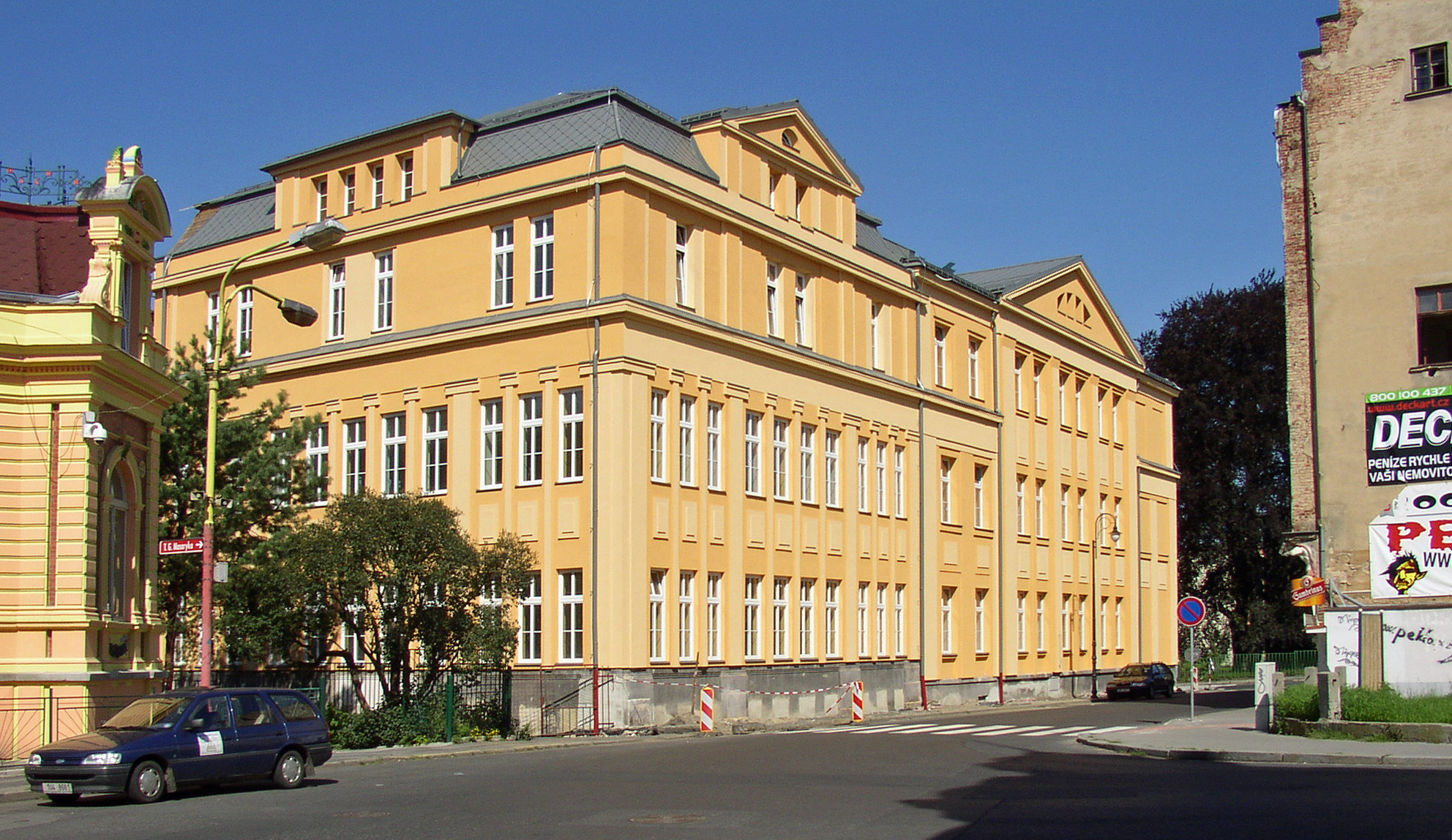 Nová knihovna ve Varnsdorfu